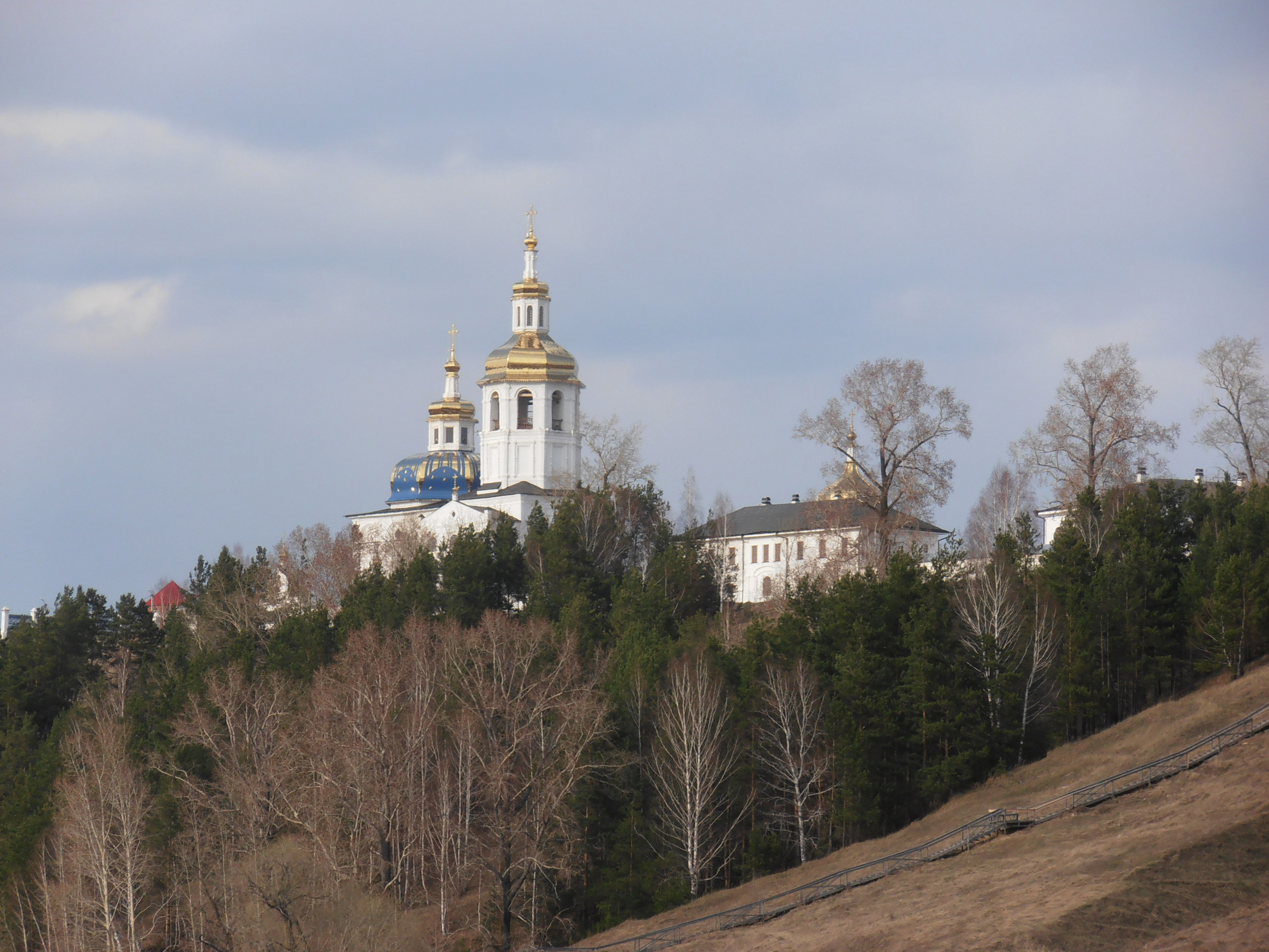 Вид с Иртыша на Абалакский монастырь в приближении